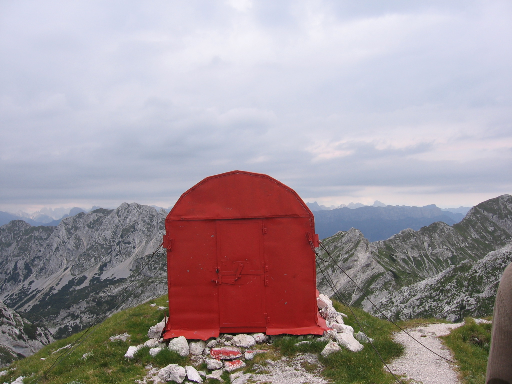 Bivacco invernale del rifugio Semenza